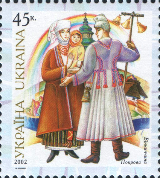 Марка з серії "Народний одяг України" 2002 Вінниччина Покрова